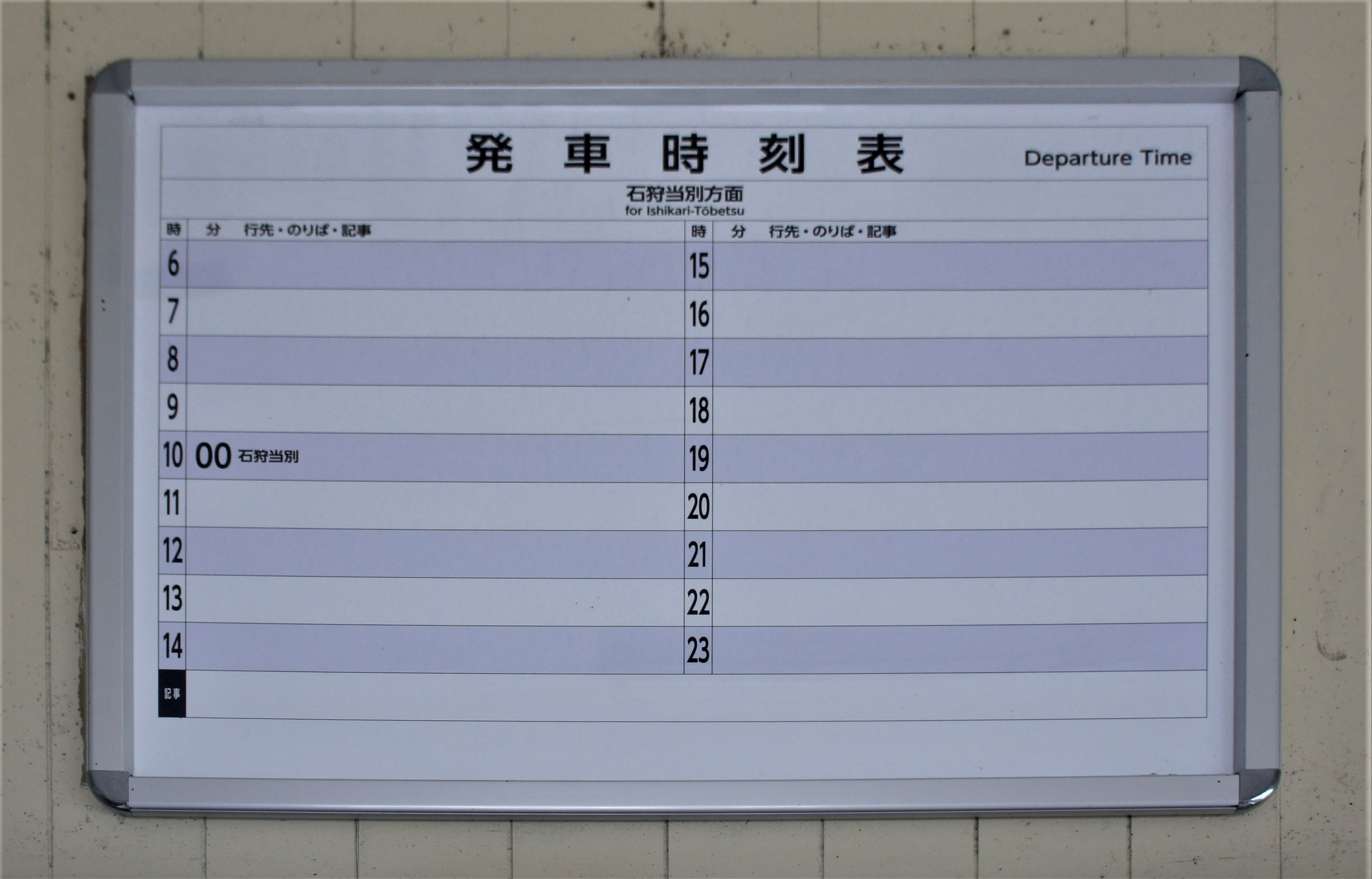 JR札沼線・新十津川駅の発車時刻表（2018年5月20日時点）